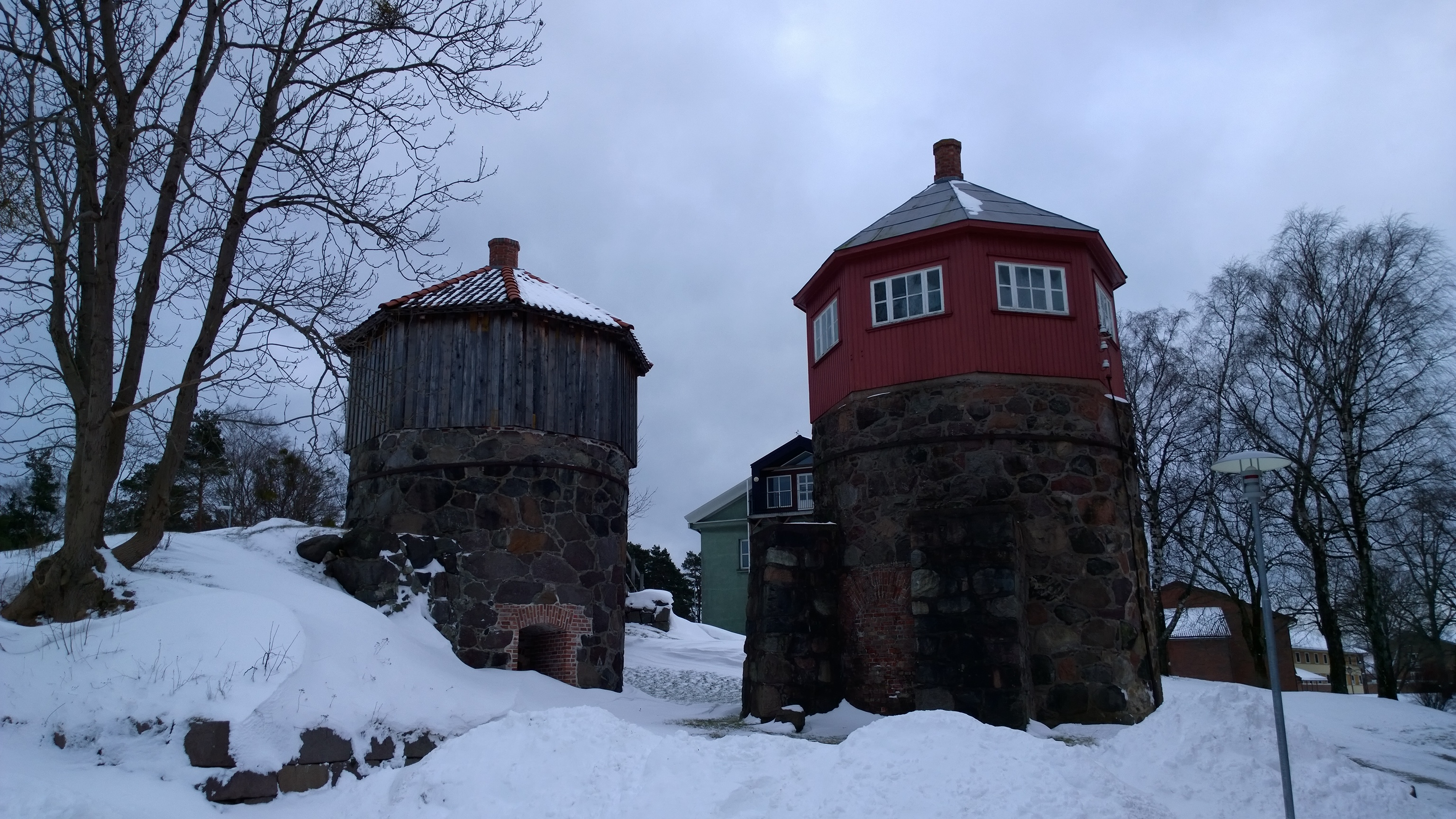 Kalkmøllene på Karljohansvern i Horten.